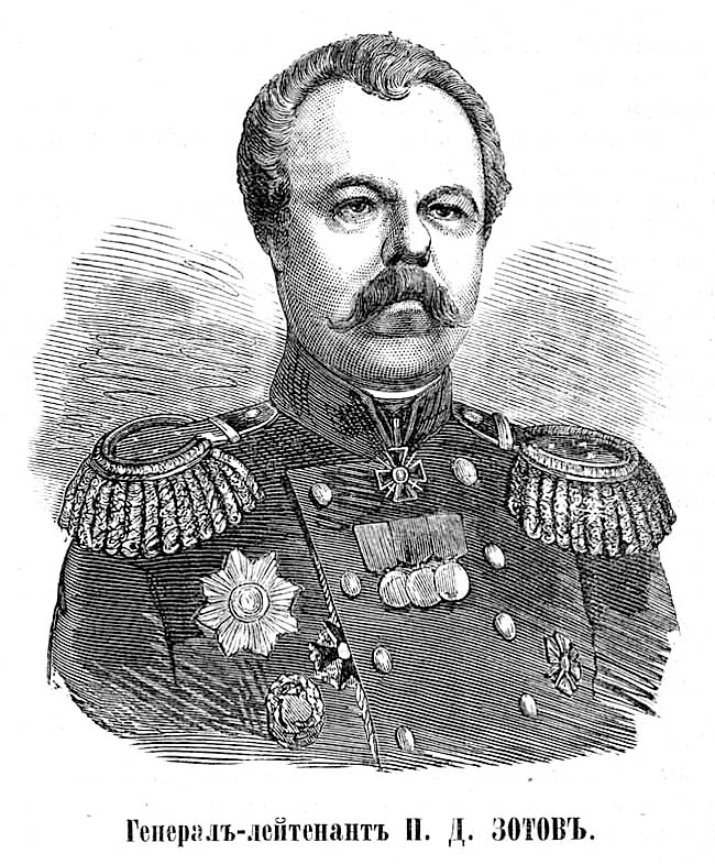 генерал-лейтенант П. Д. Зотов. Это изображение также было использовано для иллюстрирования статьи «Зотов, Павел Дмитриевич» опубликованной в десятом томе «Военной энциклопедии», который был издан книгоиздательским товариществом И. Д. Сытина в 1912—1913 гг. в столице Российской империи городе Санкт-Петербурге.